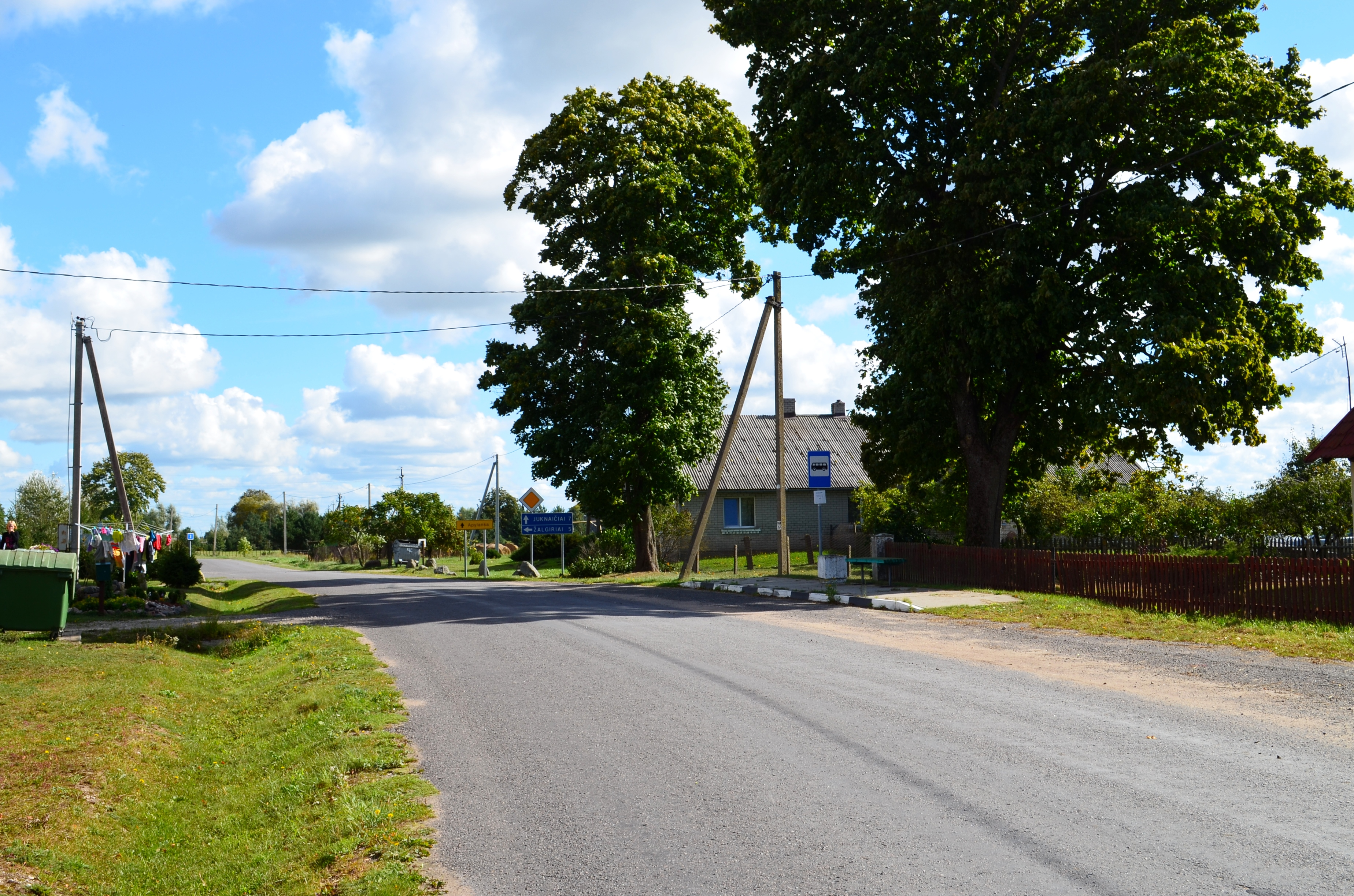 Žemaitėška: Sausgalvē, Šėlotės rajuons